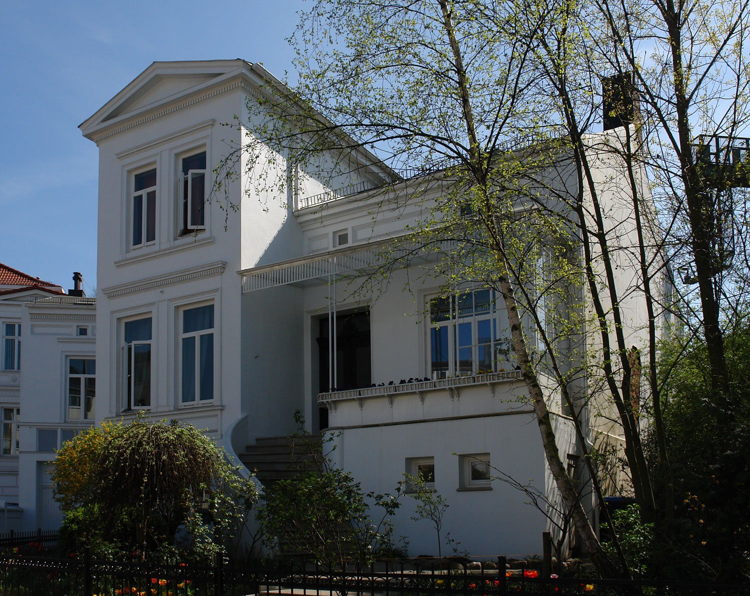 Bremen: Haus von 1861 in der Schwachhauser Heerstraße 23 (vormals Schwachhauser Chausee). Elternhaus von Paula Modersohn-Becker von 1888–1899